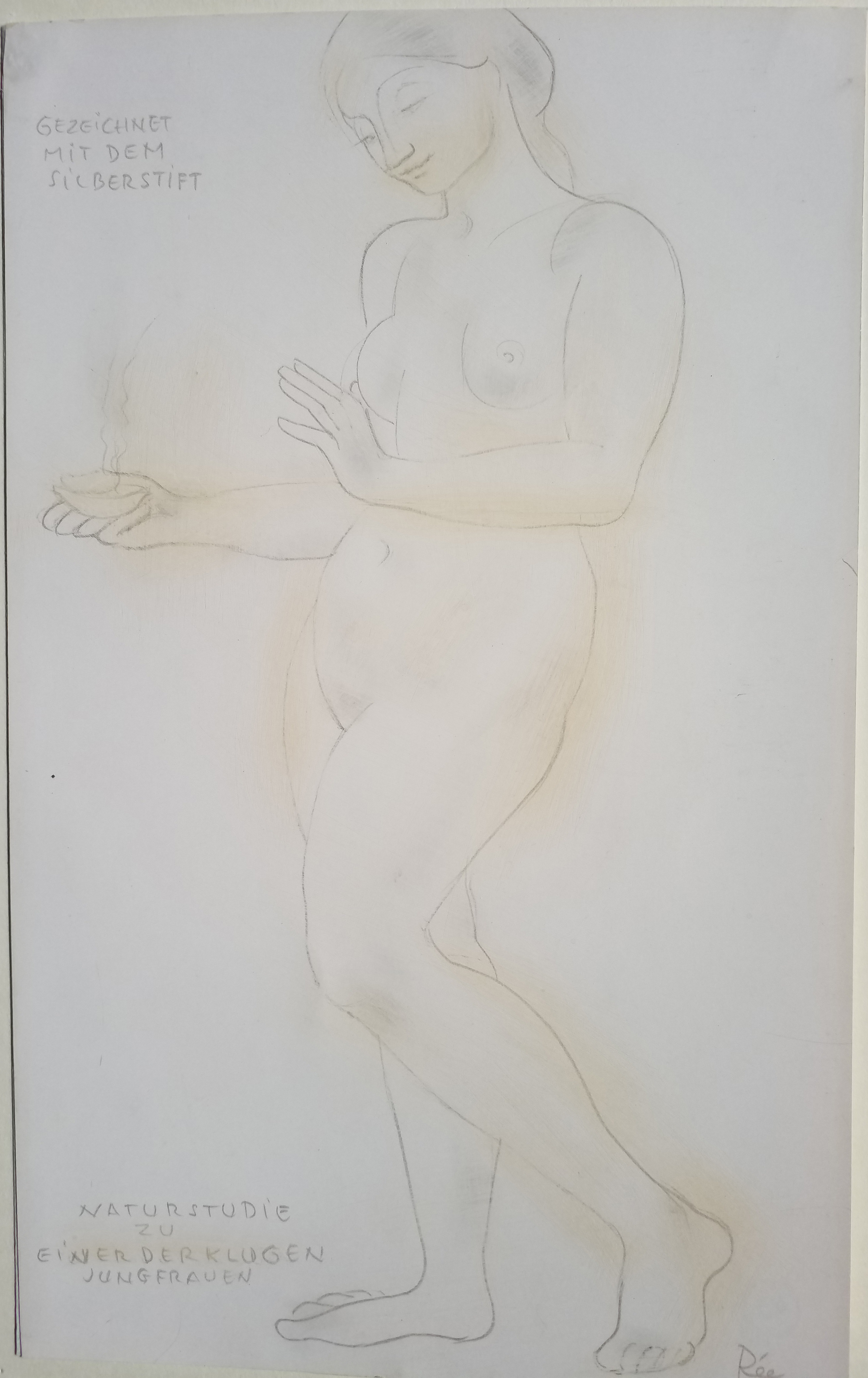 Anita Ree "Naturstudie zu einder der klugen jungfrauen". 25 cm X15.5 cm. A study for the wall-painting in Schule Uferstraße, Hamburg. Oeuvre-catalogue number Z 318 a.